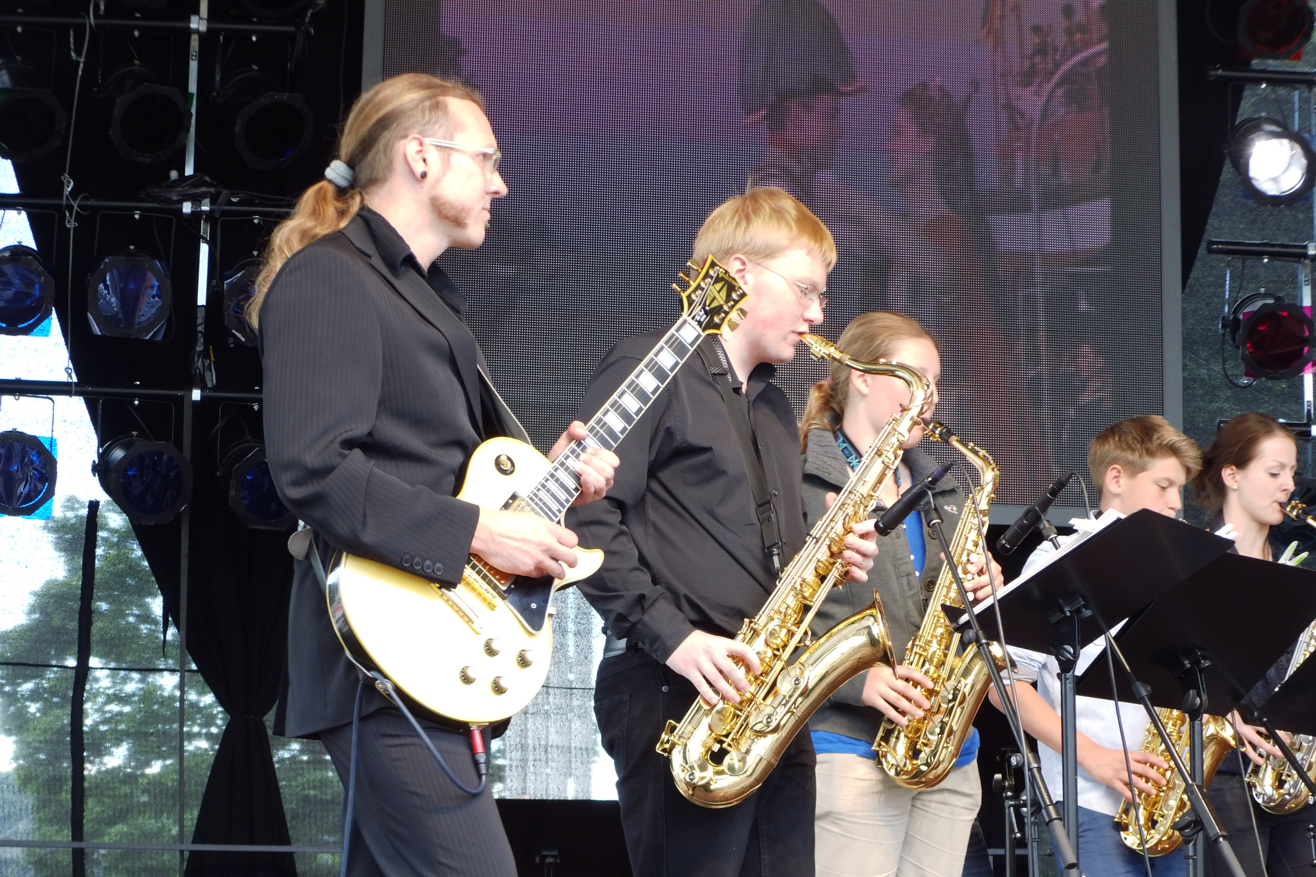 Kühbauch mit seiner Mixed Bag Boogie Band, mit der er 2012 auch auf dem Montreaux Jazz Festival spielte